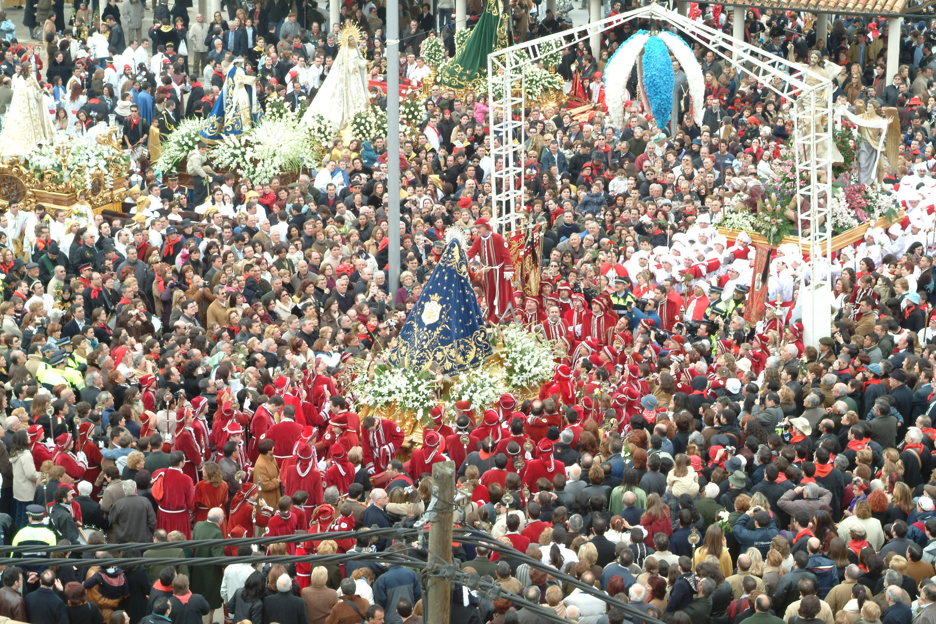 Domingo de Resurrección (Hellín) Retirada del Puñal a Nuestra Señora de los Dolores.